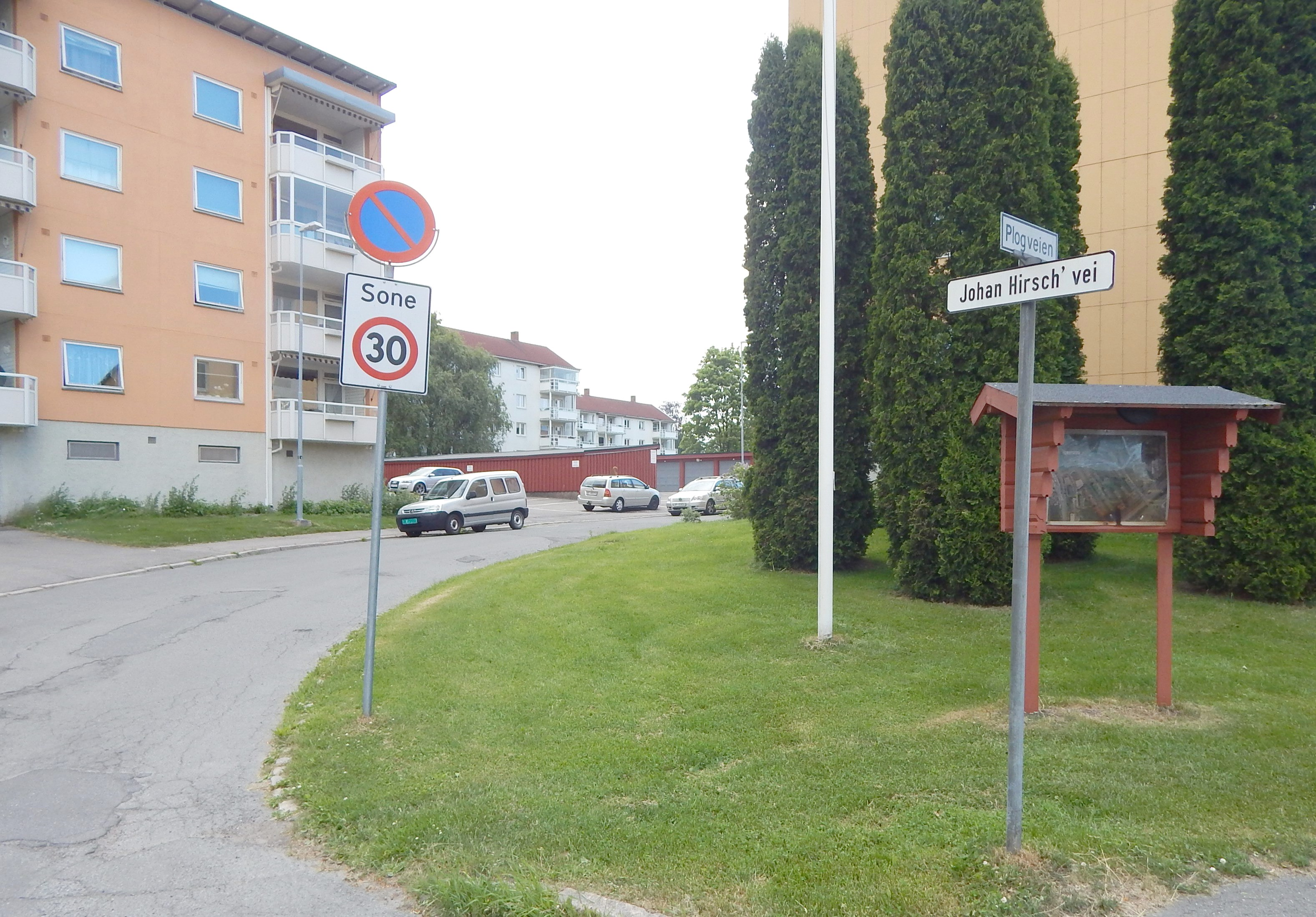 Johan Hirsch' vei